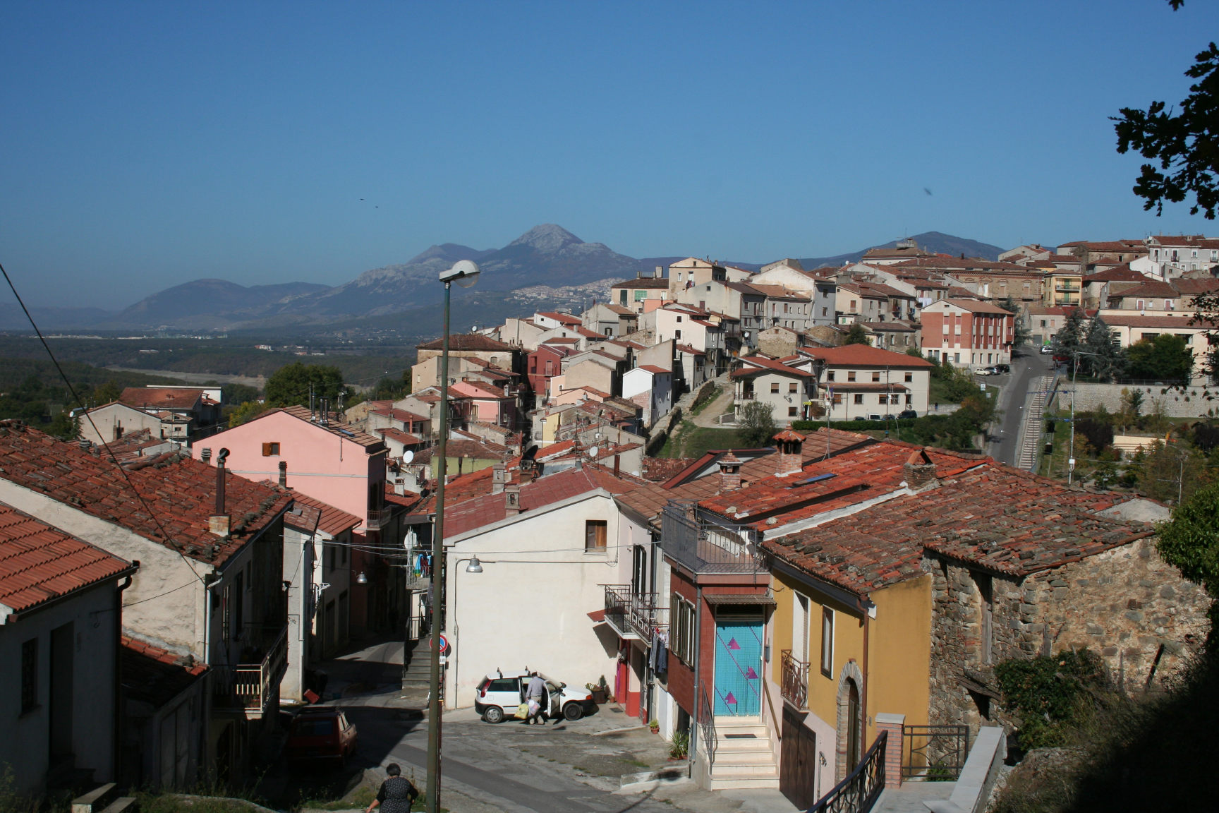 (C) 2006 Michele "O-Zone" Pinassi - Foto scattata in Novembre 2006 dal "calvario" di Spinoso.